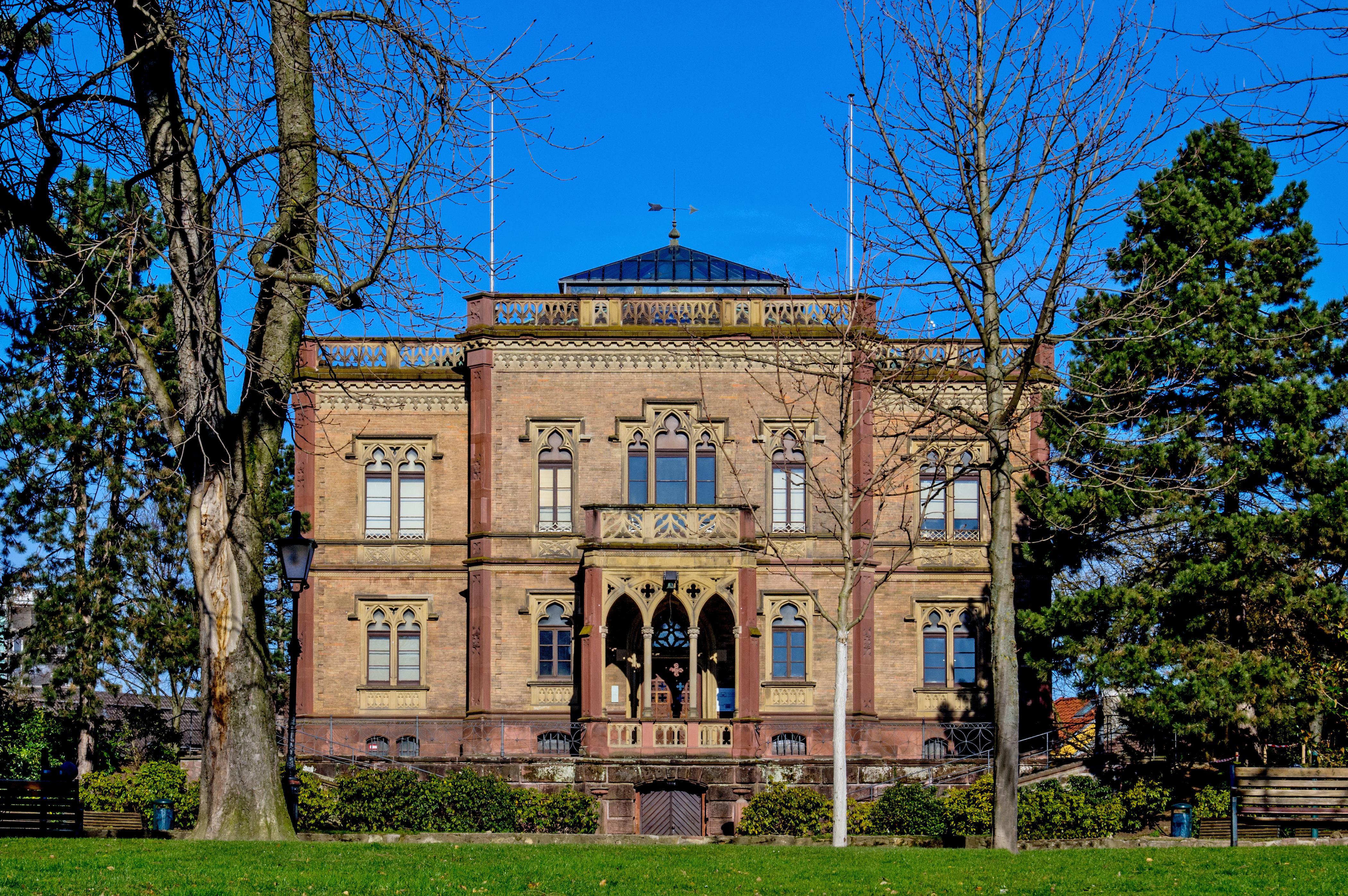 das Colombischlösse in Freiburg